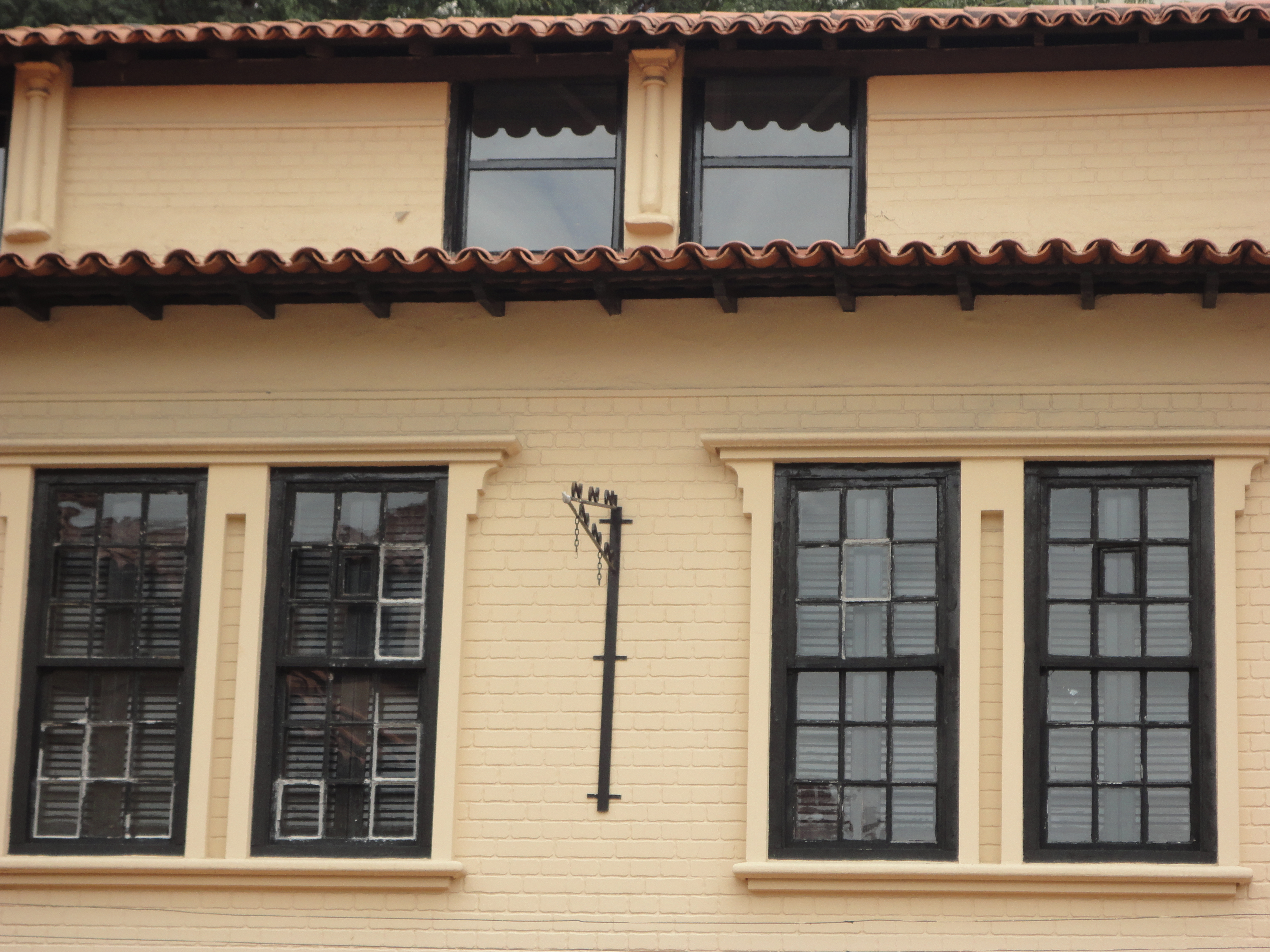 Detalhe de casa da Vila dos Ingleses, em São Paulo (SP), Brasil.